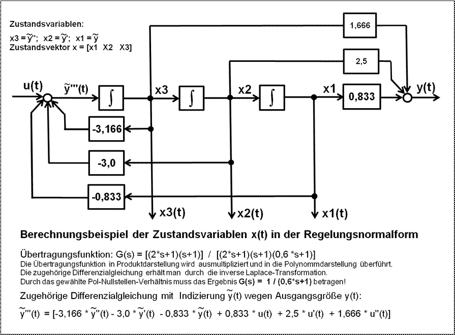 Blockschaltbild eines Berechnungsbeispiels mit Zustandsvariablen in der Regelungsnormalform